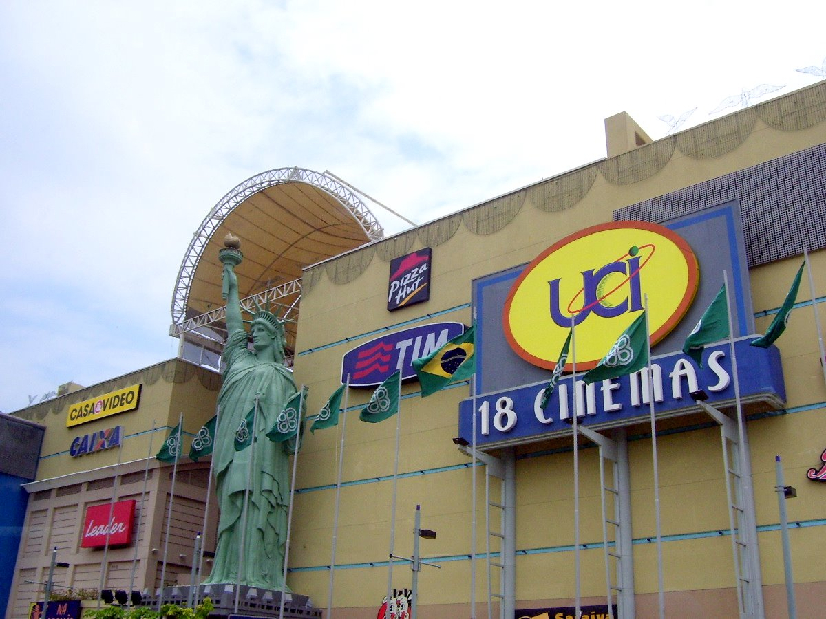 New York City Center, Barra da Tijuca, Rio de Janeiro, Brasil